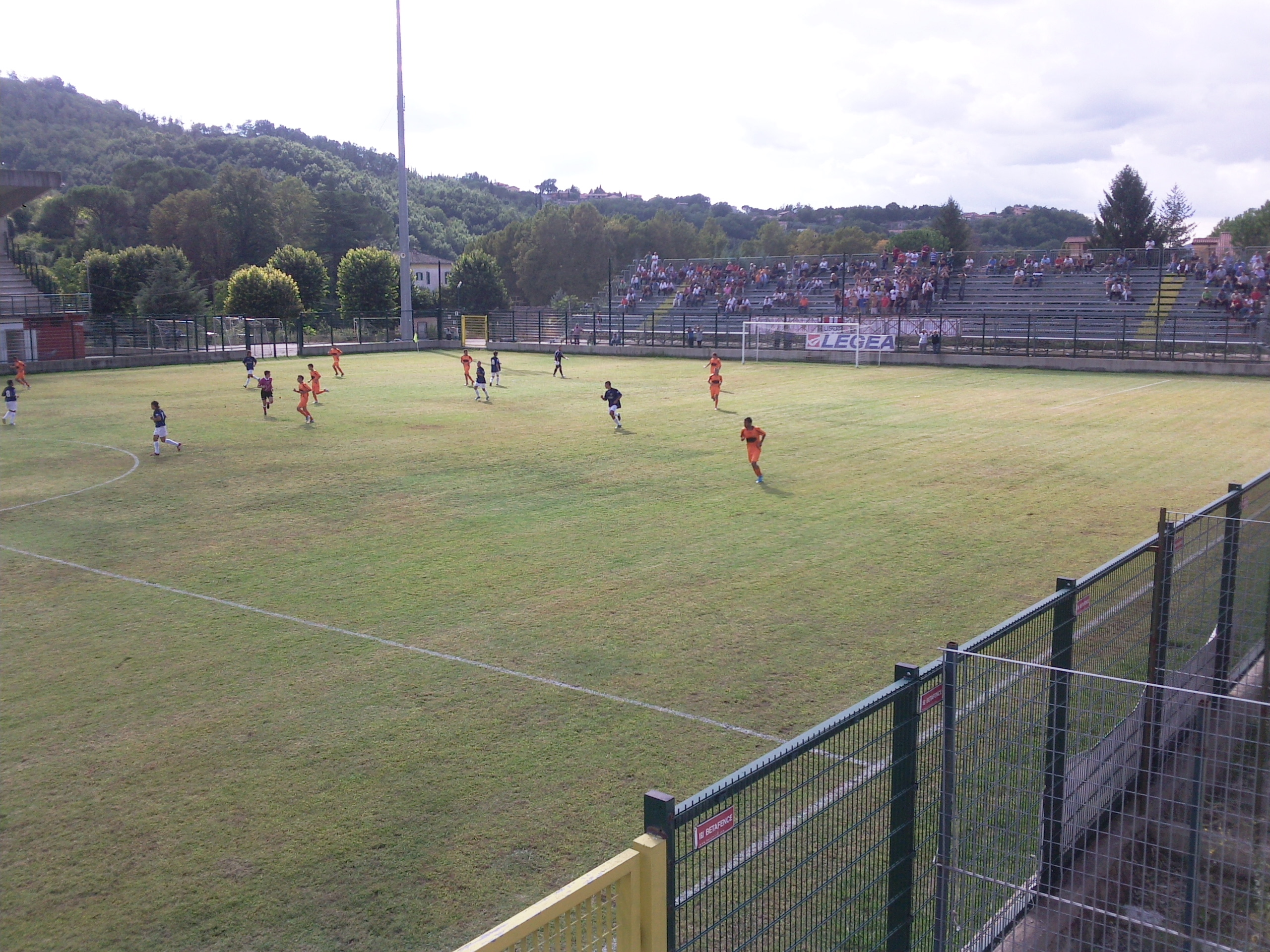 settore curva stadio nazareth isola del liri 2012